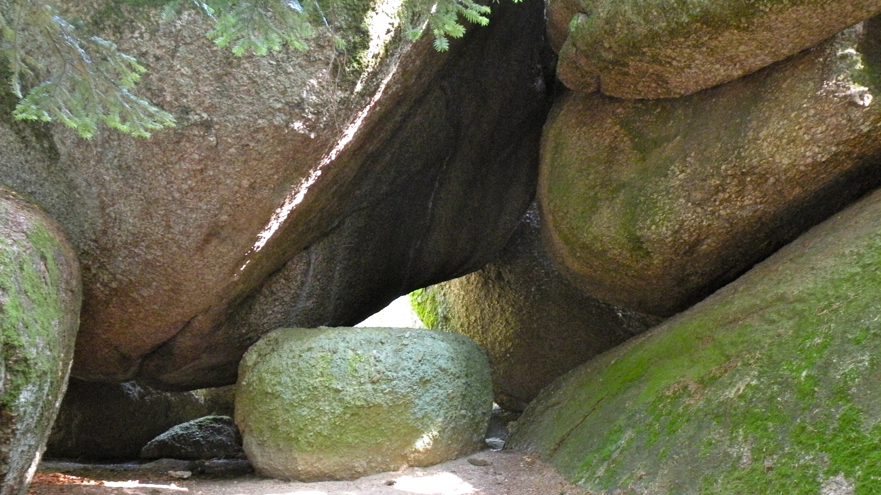 Eingang zum Naturdenkmal Zigeunermauer im Naturpark Mühlviertel in der Marktgemeinde Sankt Thomas am Blasenstein im Bezirk Perg in Oberösterreich This media shows the natural monument in Upper Austria with the ID nd393 (Zigeunermauer).